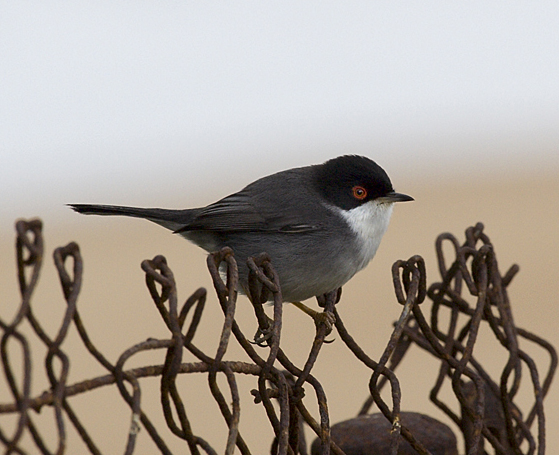 Samtkopf-Grasmücke (Sylvia melanocephala) auf einem rostigen Zaun, aufgenommen in Portugal